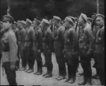 Сердюки лубенського кінно-козачого полку на параді в Києві у вересні 1918 р.: дивись назву